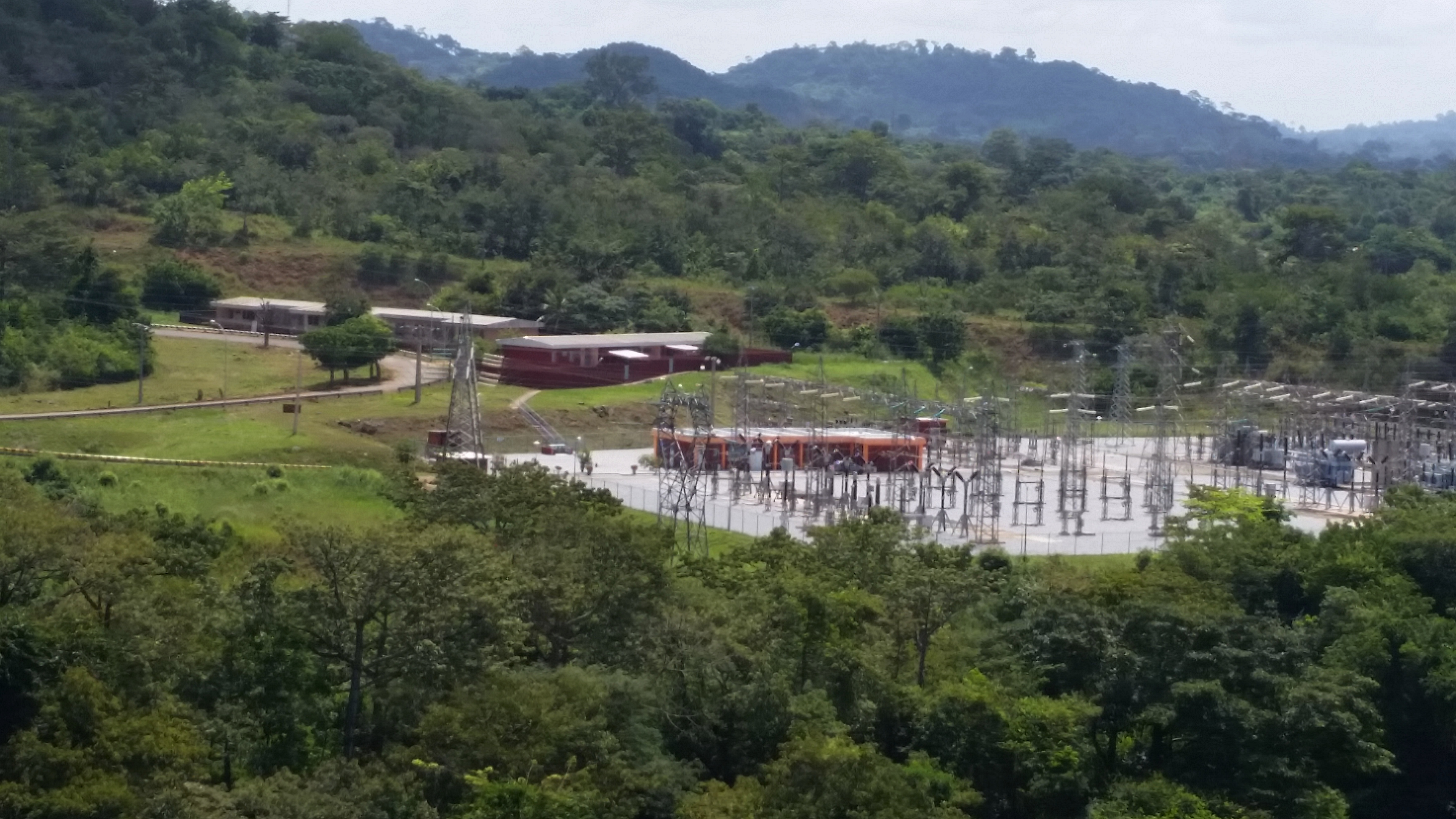 סכר קוסו הסוכר את נהר בנדמה ויוצר את אגם קוסו בחוף השנהב מפעל החשמל ליד הסכר